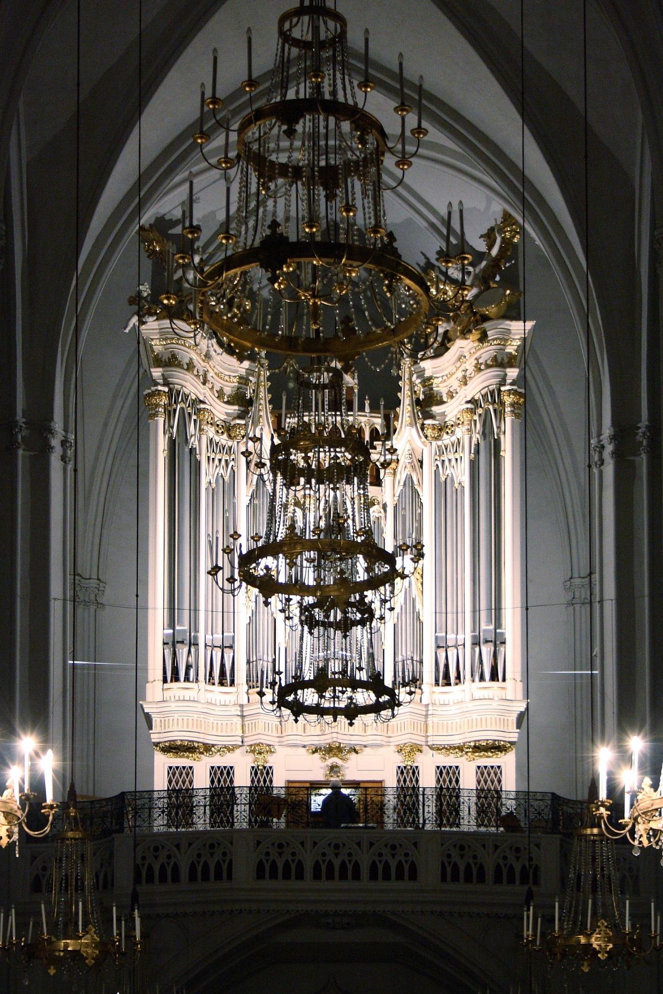 Die Hauptorgel der Wiener Augustinerkirche von der Orgelbaumanufaktur Rieger in einem historischen Gehäuse aus der Zeit um 1730.